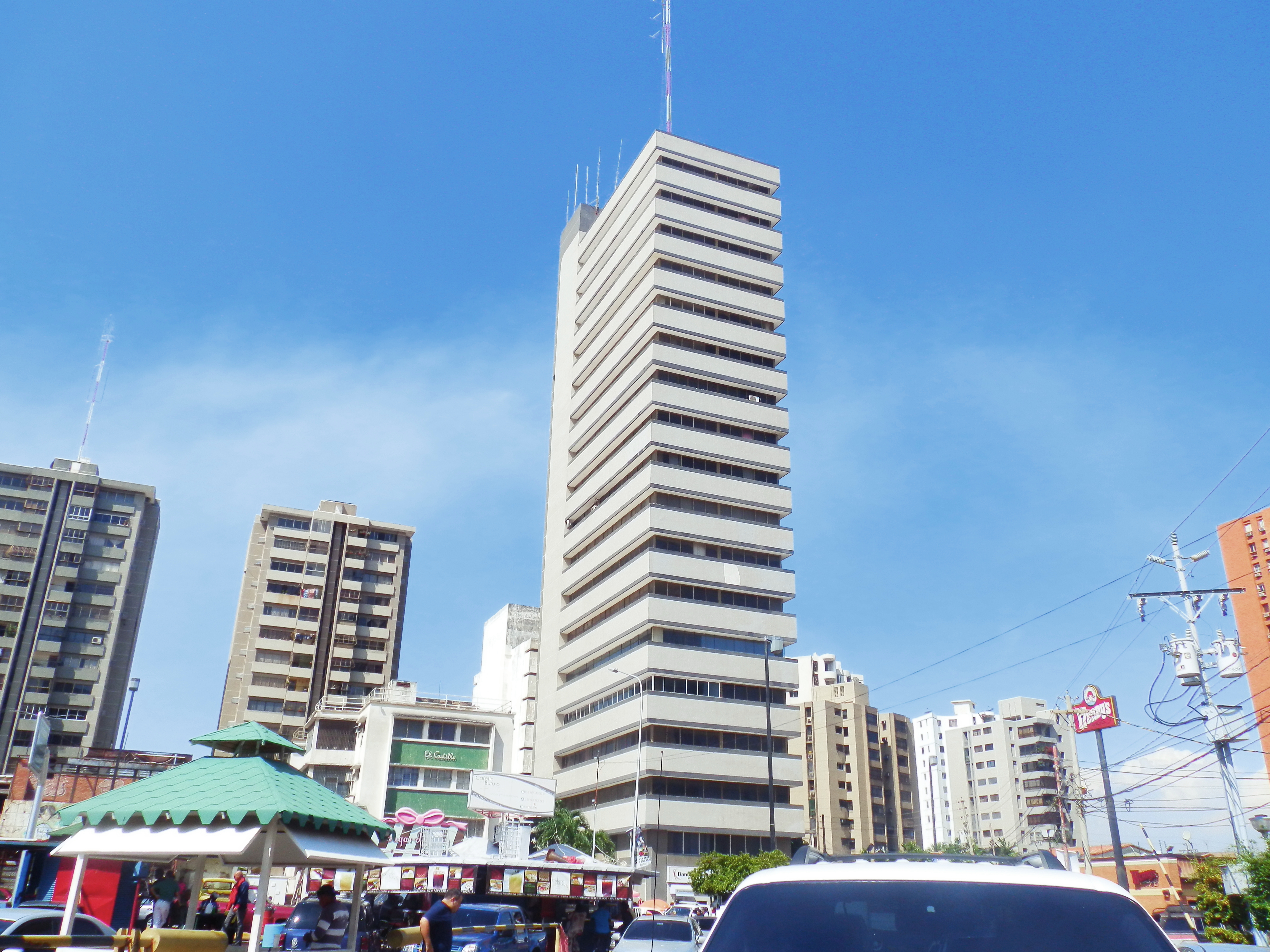 Edificios en la Avenida 5 de Julio, Maracaibo, Venezuela